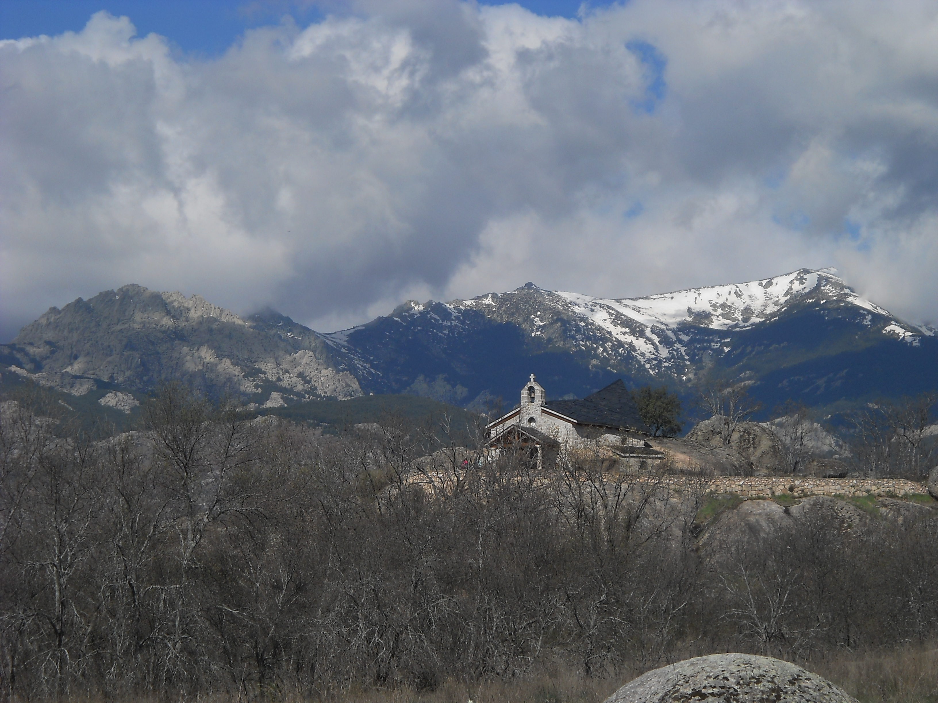 Eremo della Vergine del Rosario, Soto del Real, Madrid, Spagna